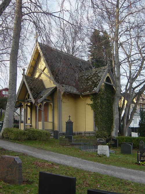 Molde and the chapel at Nedre kirkegård i Molde, Norway.